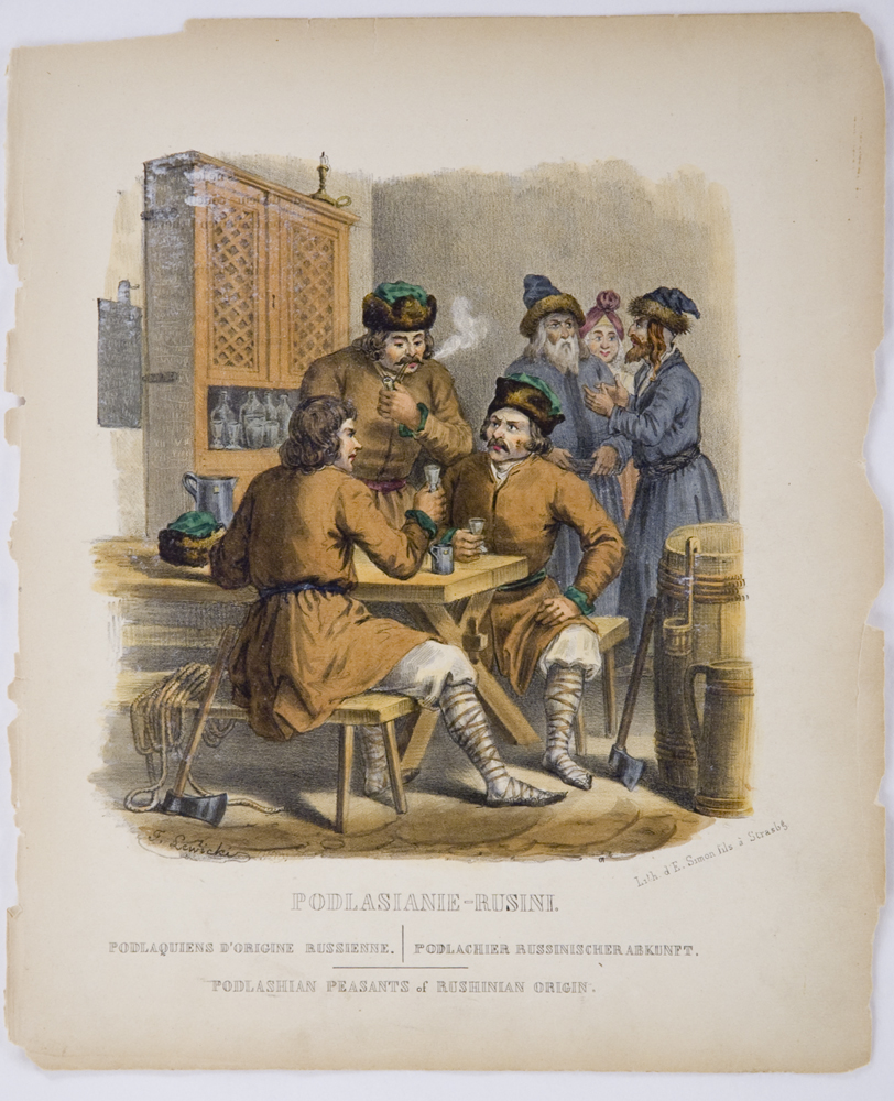 Русины Подляшья. Вторая половина XIX века.